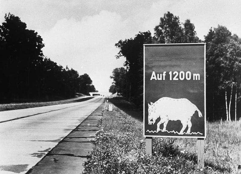 Information added by Wikimedia users.Reichsautobahn Berlin-Stettin. Ankündigungstafel "Wildwechsel durch Wildschweine". Diese mit Reflektoren ausgestatteten Zeichen gab es mit dem Sinnbild des Hirsches, des Rehes und des Wildschweines. Sie wurden ab 1938 versuchsweise aufgestellt. Man hoffte, die Tafeln möglicherweise wieder abbauen zu können, wenn sich die Tiere an die Veränderungen ihres Lebensraums gewöhnt und neue Futterplätze gefunden hatten. Quelle: Theodor Schattenmann Reichsautobahnen. In: Deutsche Verwaltung. Organ der Verwaltungsrechtswahrer des Nationalsozialistischen Rechtswahrerbundes. 18. Jahrgang, Heft 15 (1941). S. 287 ff.; hier: S. 290.